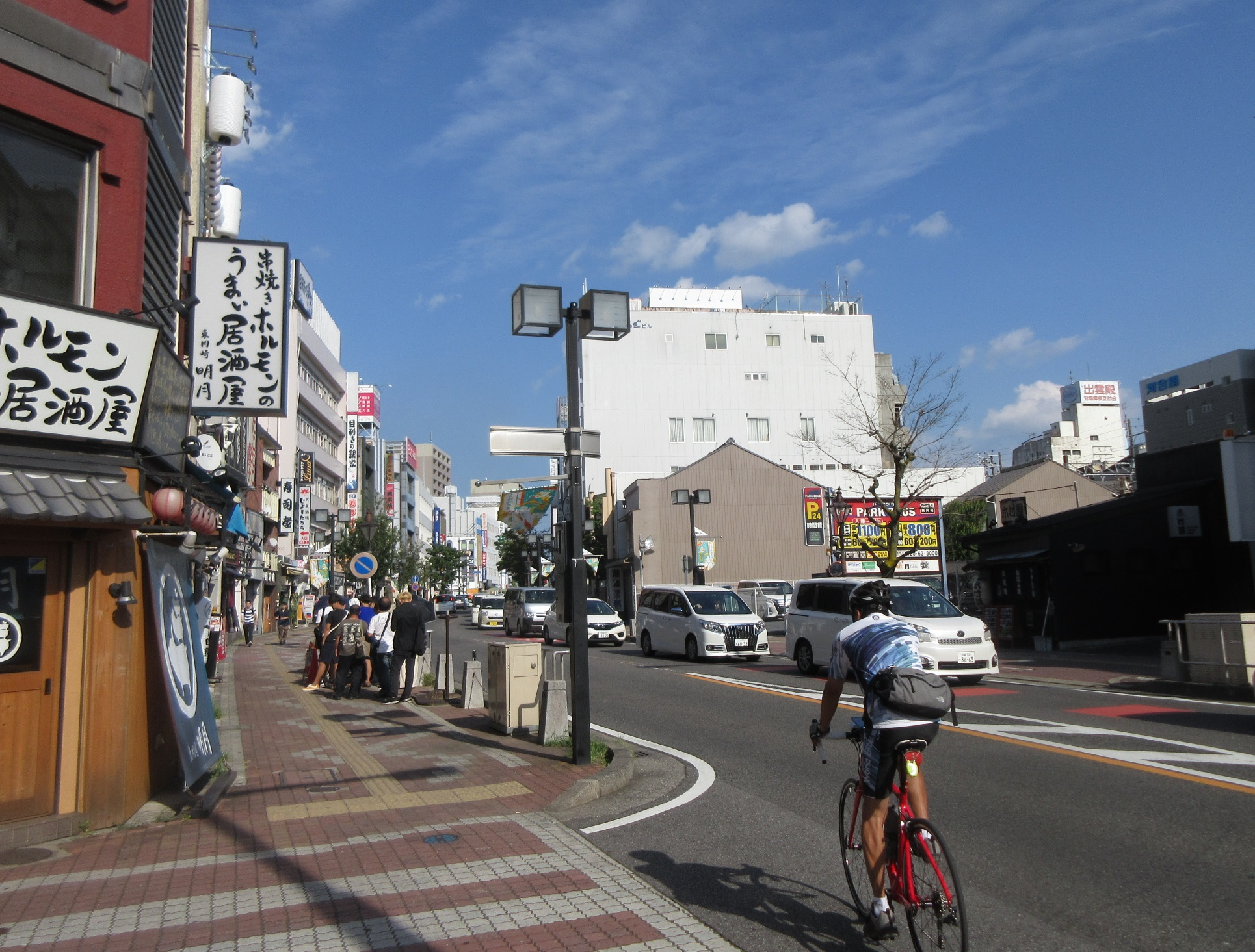 愛知県道477号東大見岡崎線。別名、東岡崎駅前通り。